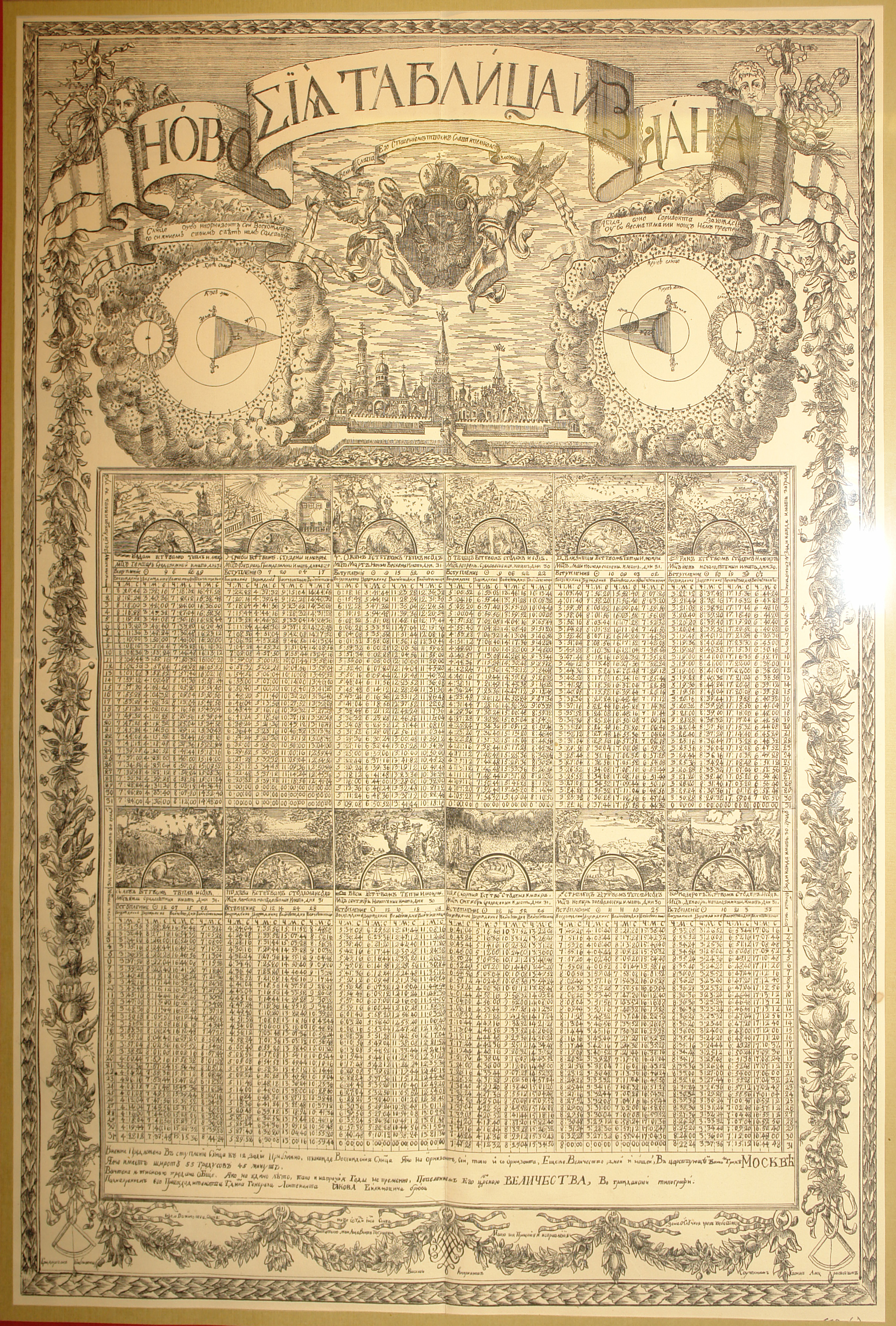 Брюсовы астрономические таблицы. 1720. Гравюра на меди. Всероссийский музей А.С. Пушкина (Санкт-Петербург)